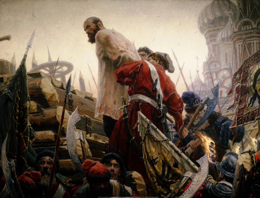 Сергей Кириллов. «Степан Разин». 1985-1988. Х.м. 192x252